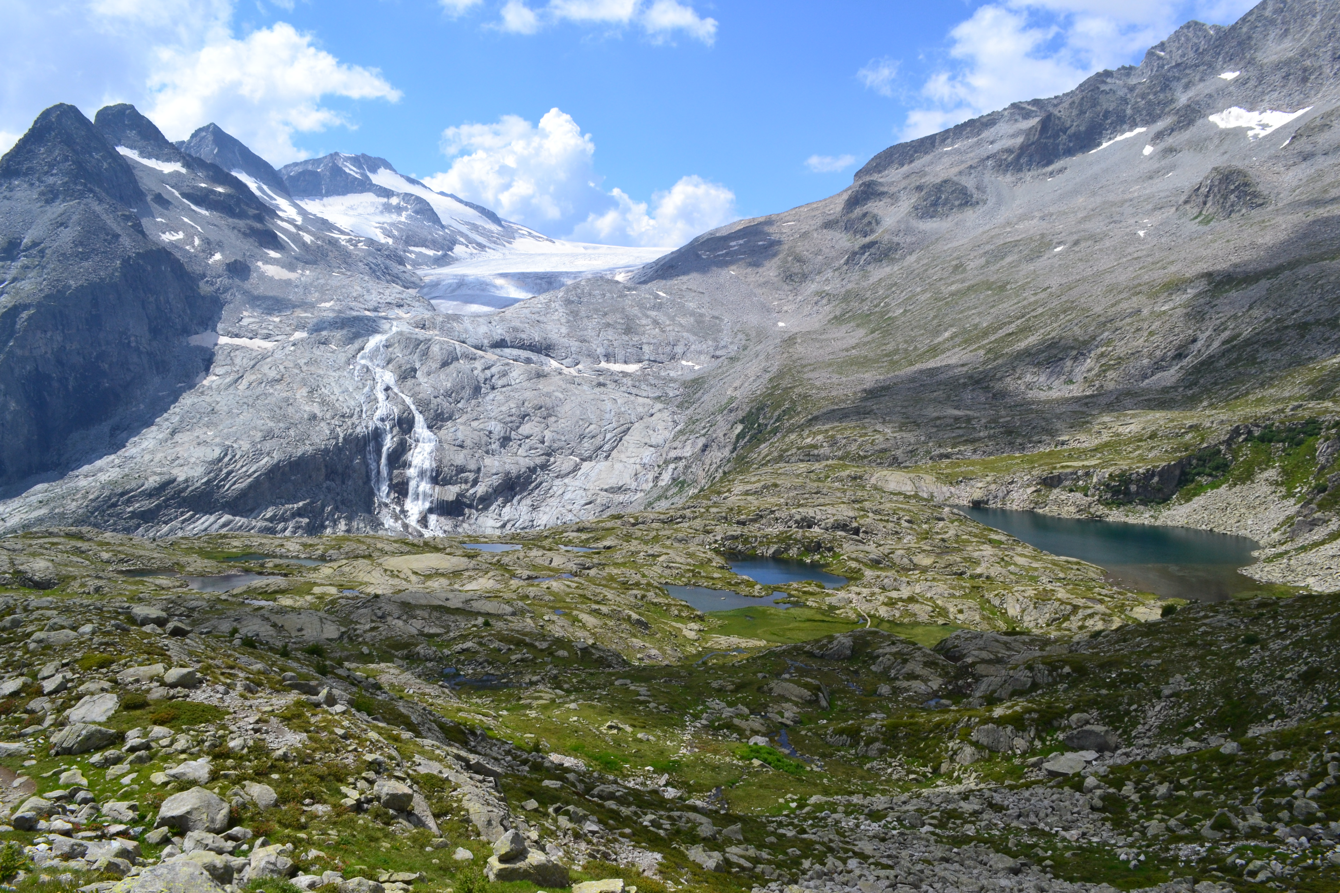 Adamello (Q47510451)